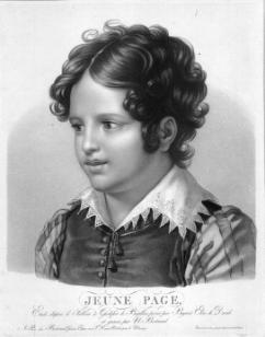 Jeune Page, étude d'après le tableau de Godefroi de Bouillon peint par Henri Buguet, élève de David, et gravée par N. Bertrand.